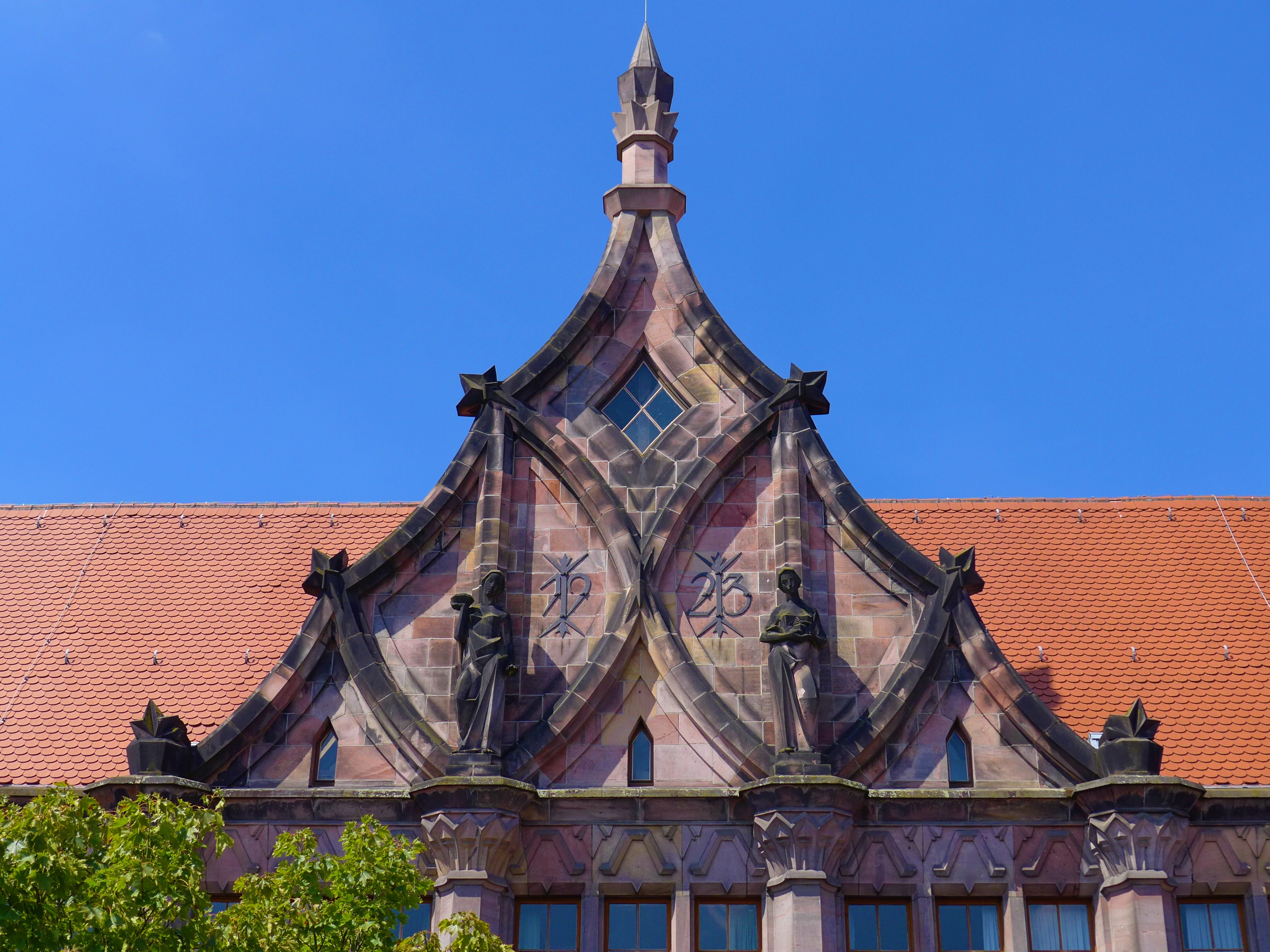 Rathaus St. Johann, Giebel Erweiterungsbau von 1923